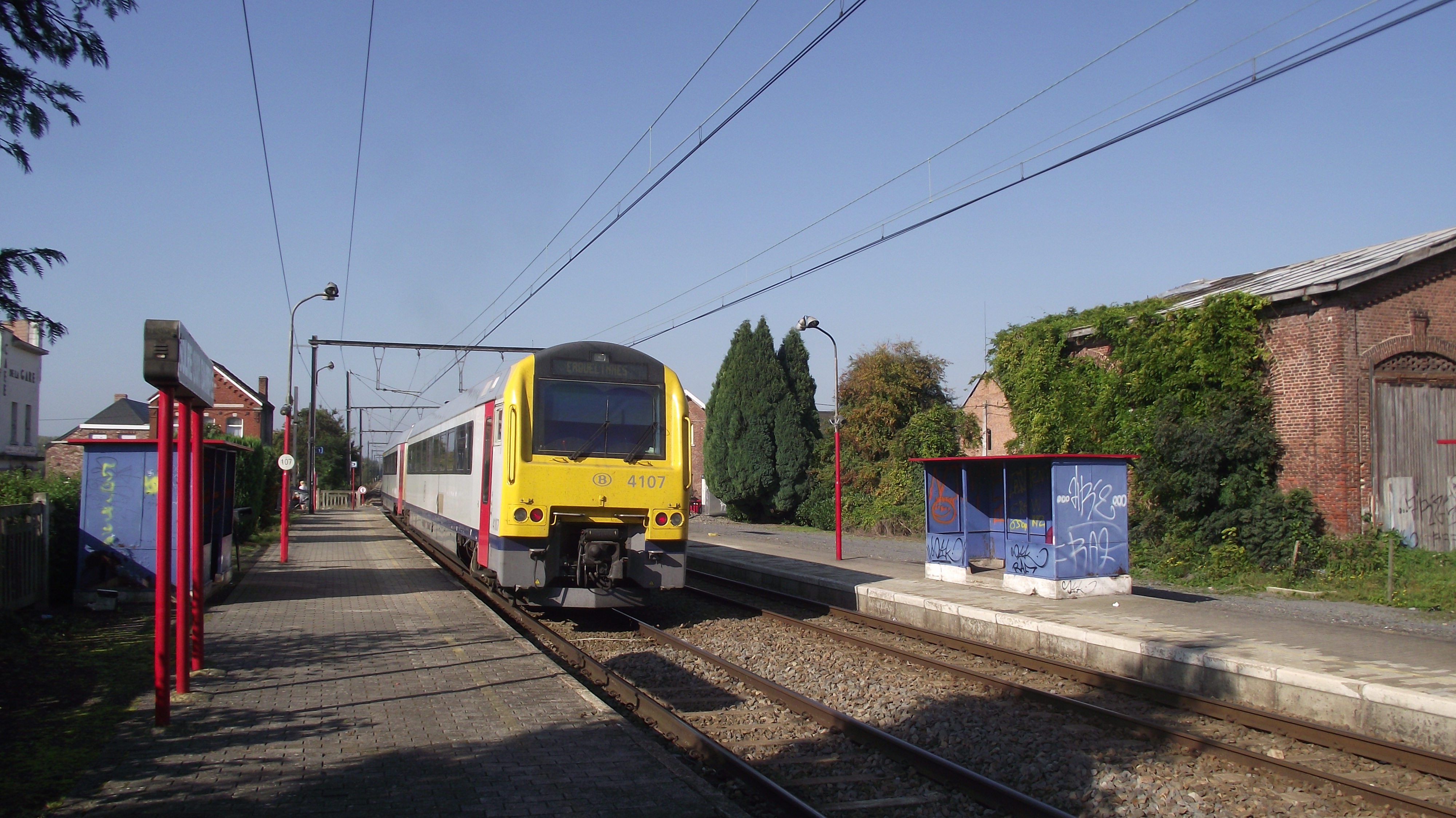 Dieseltreinstel in Solre-sur-Sambre halte. Hoewel de lijn volledig is geëlektrificeerd worden sommige ritten met dieseltreinstellen gereden.